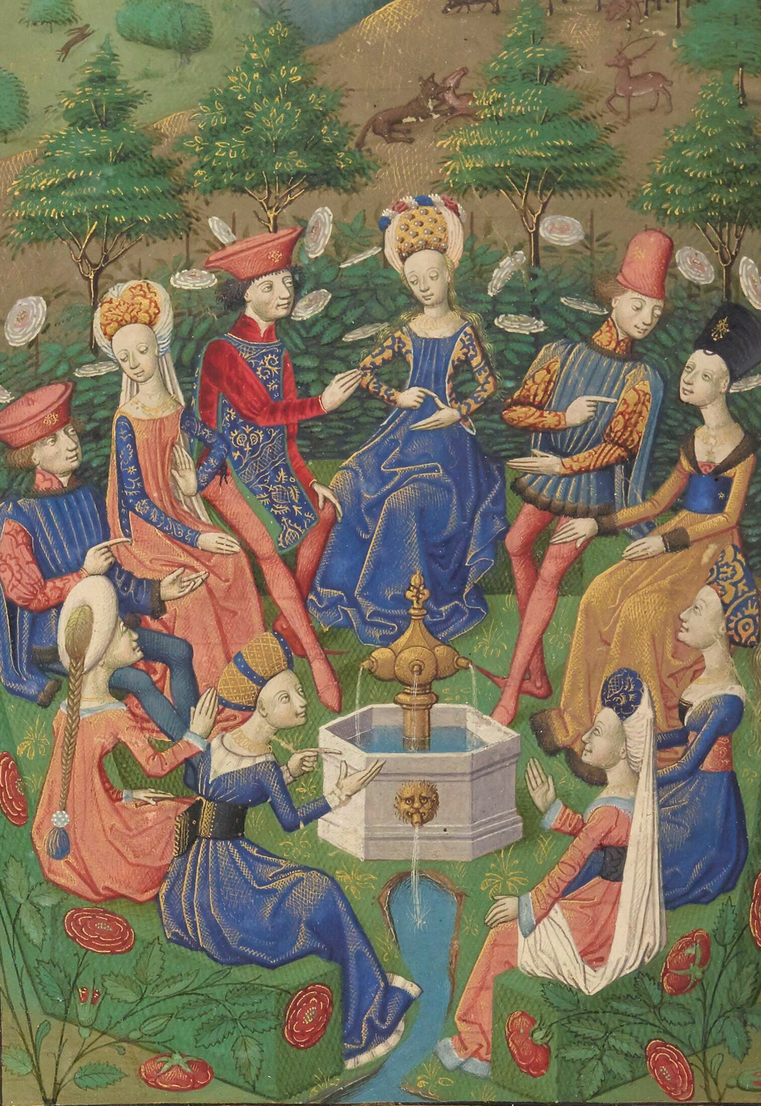 Decameron